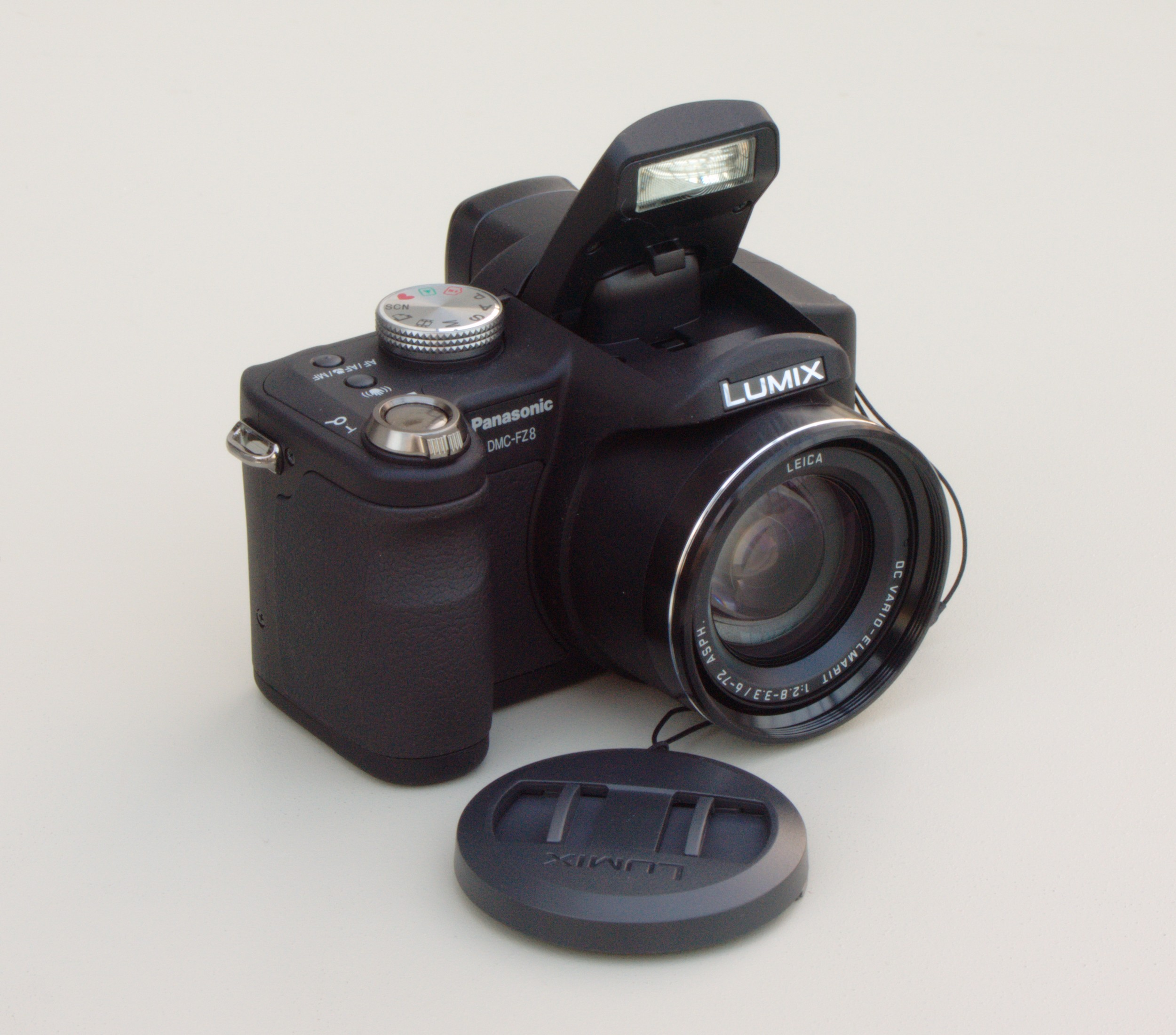 digitale Bridgekamera Lumix DMC-FZ8 der Herstellers Panasonic aus dem Jahr 2007 mit aufgeklapptem Blitz und Linsenverschlusskappe